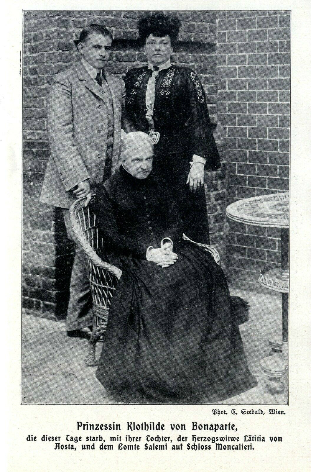 Prinzessin Klothhilde von Bonaparte mit ihrer Tochter Lätitia und dem Comte Salemi auf Schloss Moncalieri, c. 1910/1911)